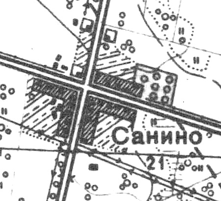 Топографическая карта Ленинградской области, квадрат О-35-12-Б-г (Петергоф), деревня Санино